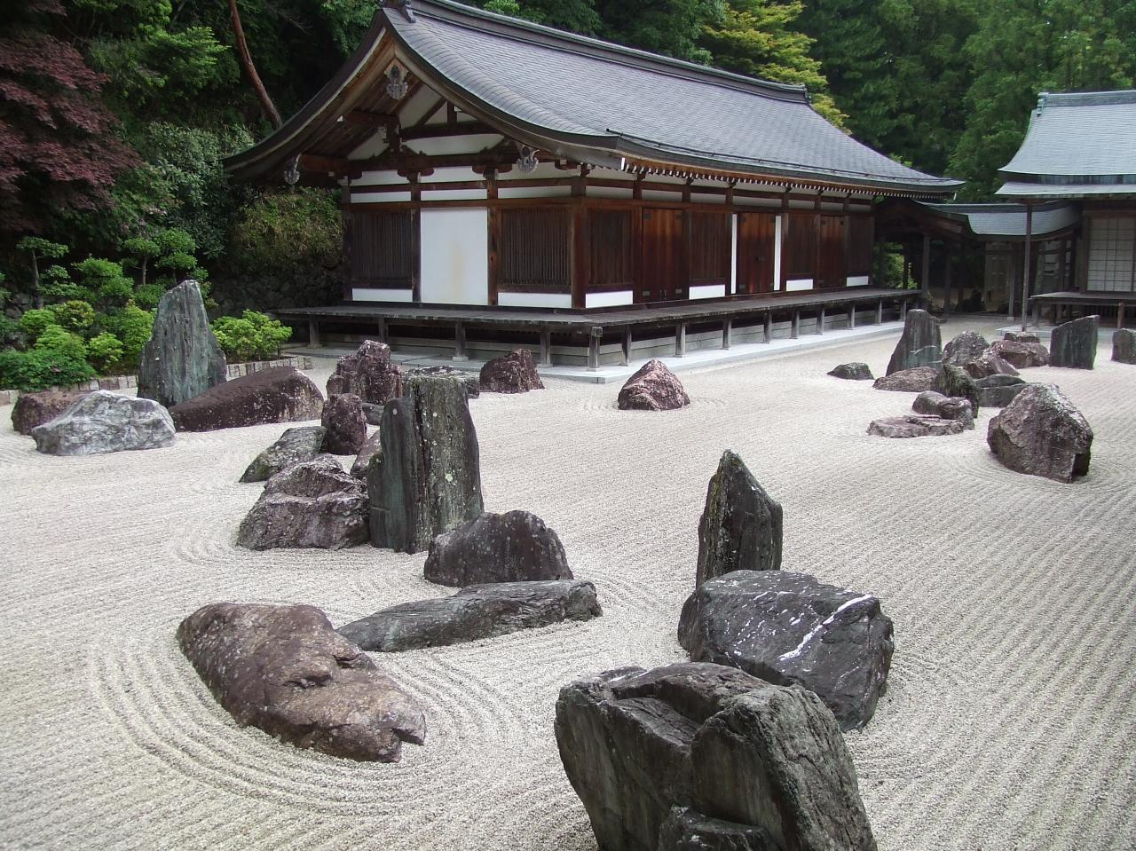 金剛峯寺の蟠龍庭